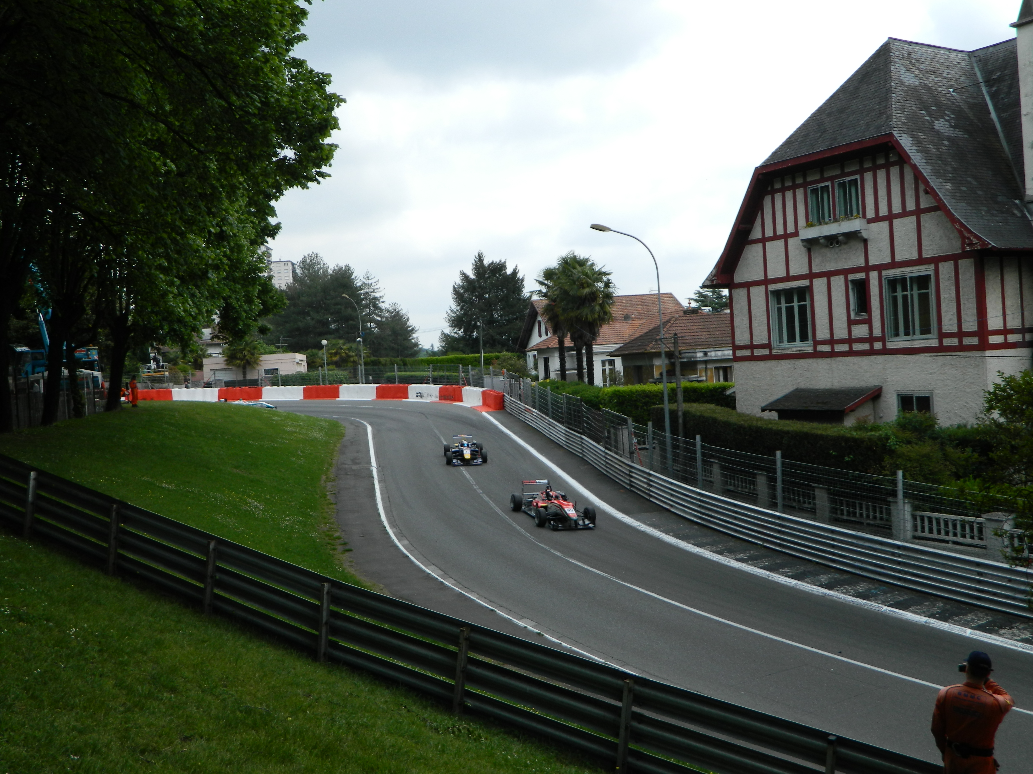 Raffaele Marcielo (99) et Carlos Sainz Junior (31) sur Formule 3 lors du Grand Prix de Pau 2012.